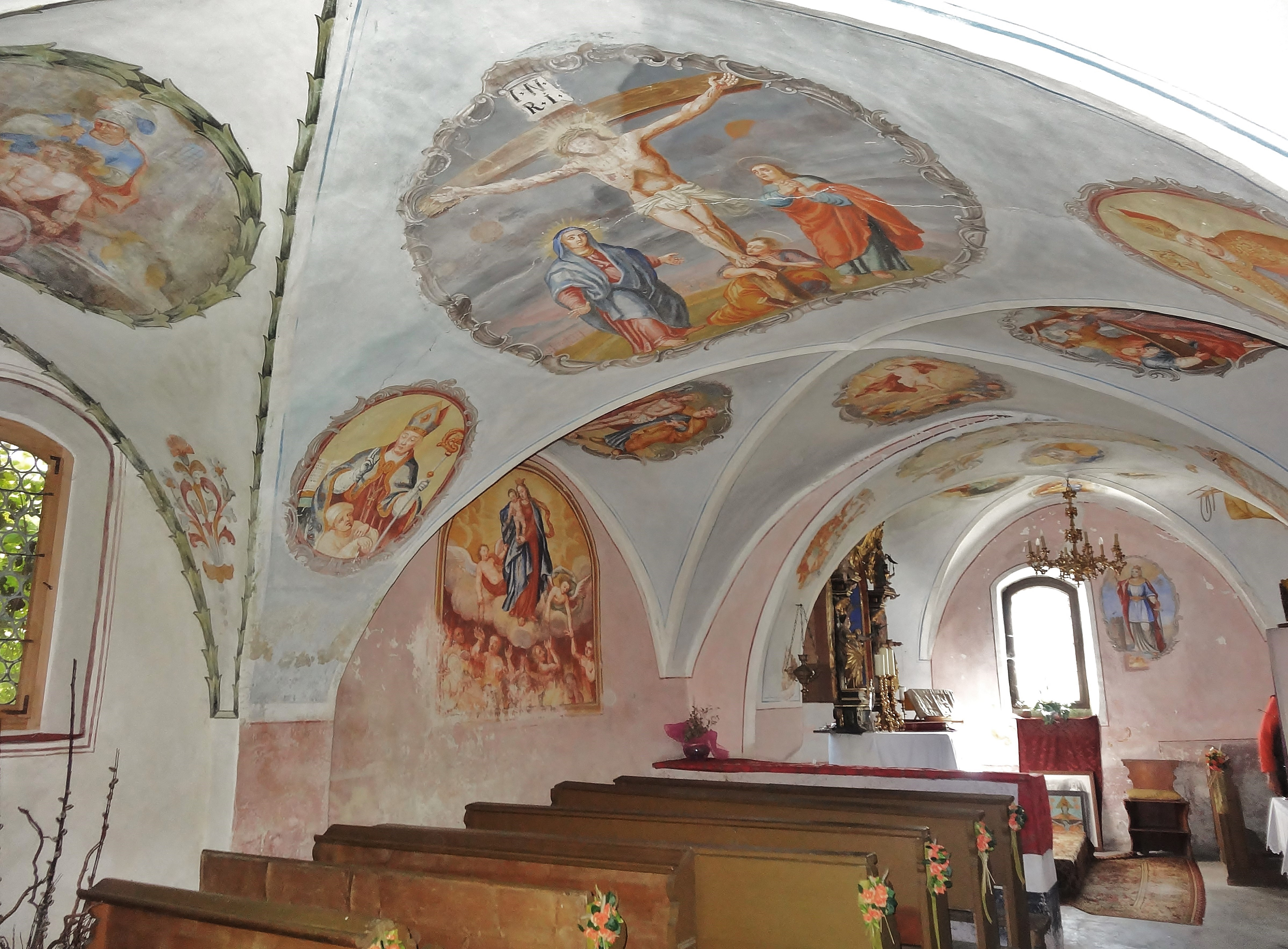 Schloss Rothenthurn bei Molzbichl, Innenansicht der Schlosskapelle